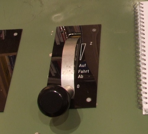 Auf-Ab-Fahrschalter eines Einheitslokführerstands (Hier auf einem Simulationsführerstand)